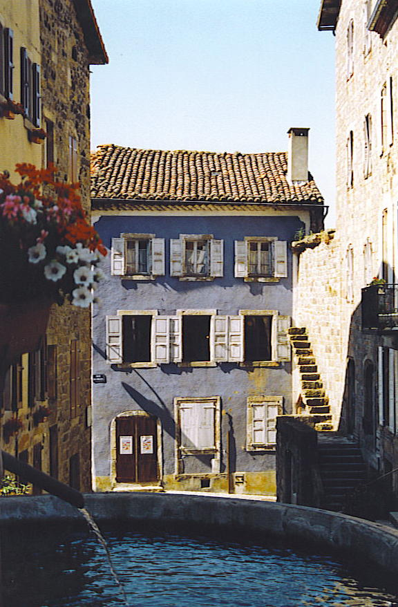 propre photo